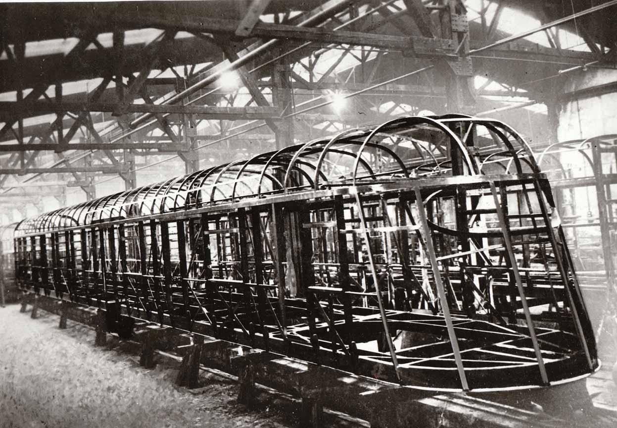 Кузов вагона дизель-поезда ДП «Розария» (трёхвагонный). на заводе Ганц-Маваг